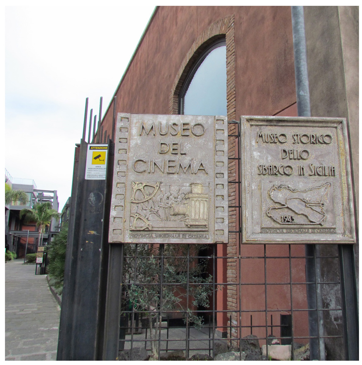 L'immagine è parte del File:Centro fieristico le Ciminiere.jpg già presente su Commons. Ilustra l'ingresso dei musei del cinema e dello sbarco in Sicilia del 1943..